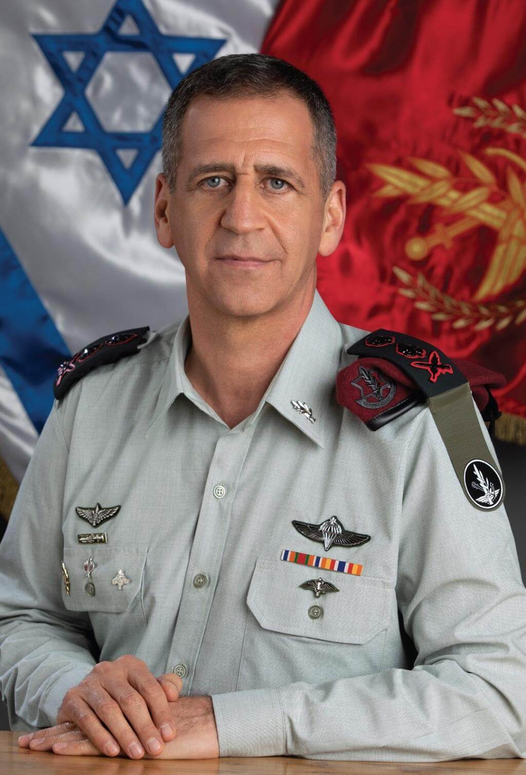 רב אלוף אביב כוכבי